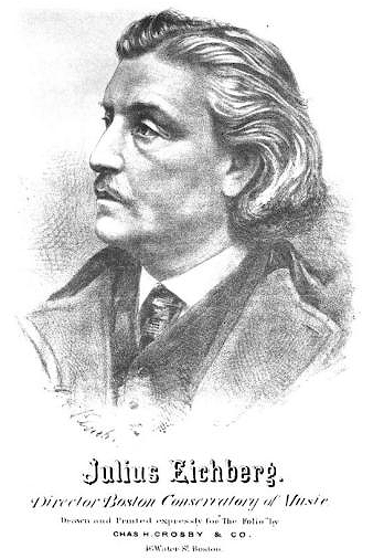 Portrait by G.A. Klucken, of Julius Eichberg